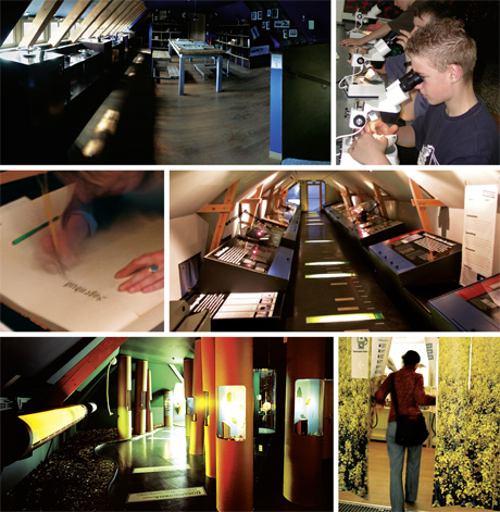 Fotos zu den sechs Themenwelten der Daueraustellung im Elementarium des Museums der Westlausitz in Kamenz